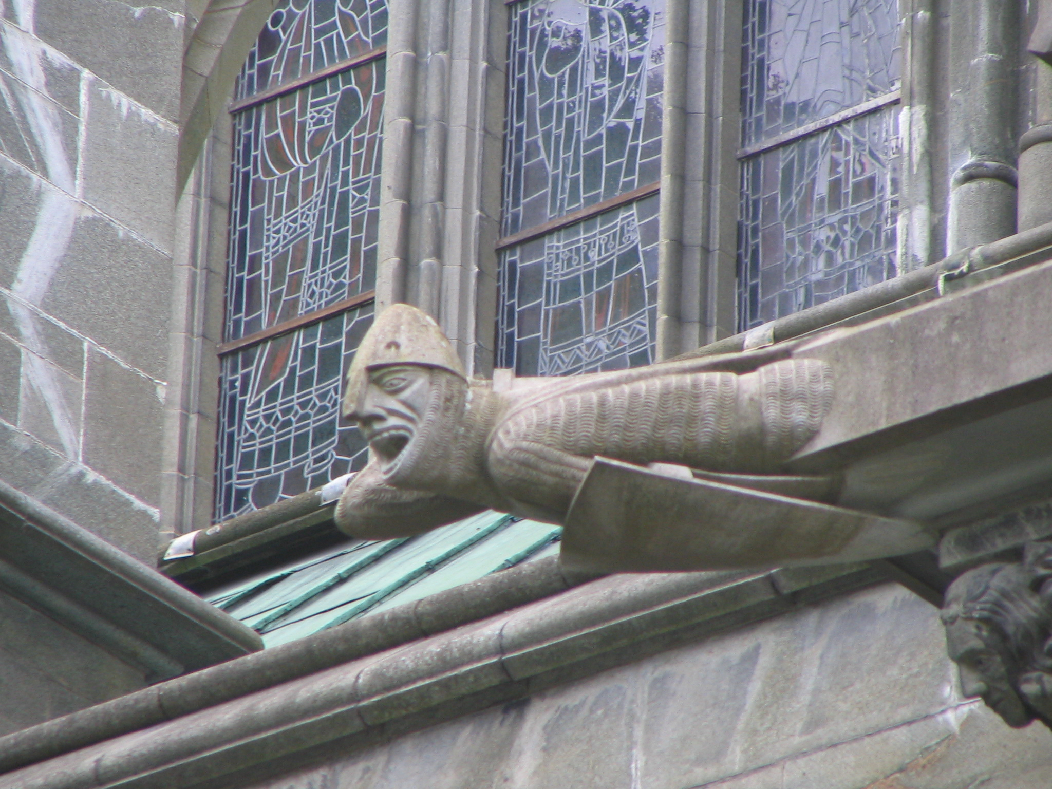 Detalj fra Nidarosdomen. Trondheim i Norge